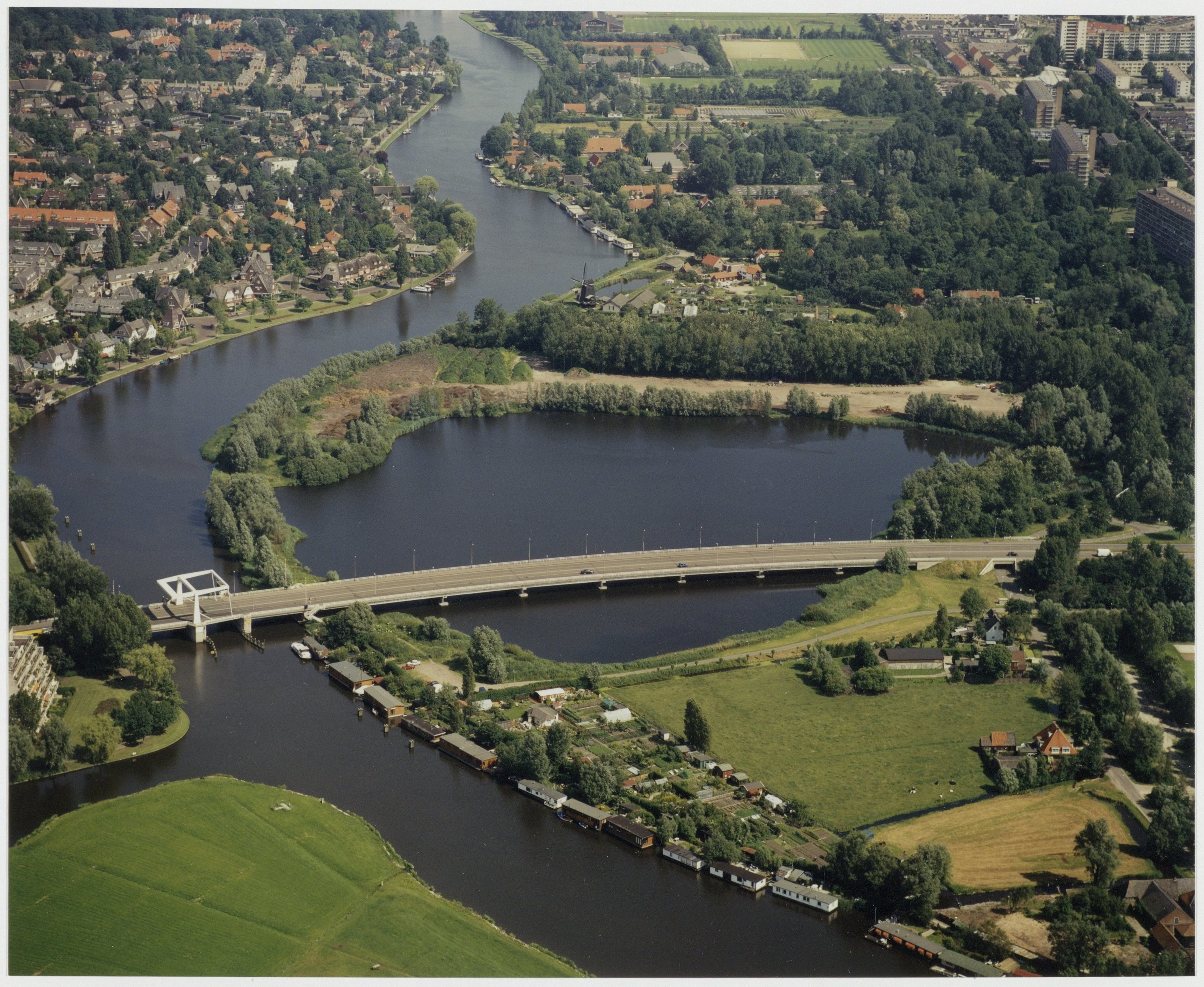 CollectieCollectie Fotoburo de BoerInventarisnummerNL-HlmNHA_54035205NL-HlmNHA_1478_4693ABeschrijvingLuchtfoto van de Put van Vink.FotonummerNL-HlmNHA_1478_5332DocumenttypeTopografische prenten, tekeningen en foto'sVervaardigerBoer, Poppe de Soort vervaardigerFotograaf AnnotatiesHD300794LandNederland ProvincieNoord-Holland GemeenteHaarlem PlaatsHaarlem Begindatum1994Einddatum1994TechniekFoto TrefwoordenLuchtfoto's